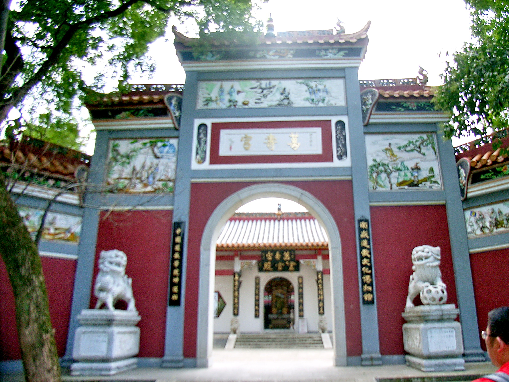 Nan Yue Da Miao temple, Héngshan, Hunan